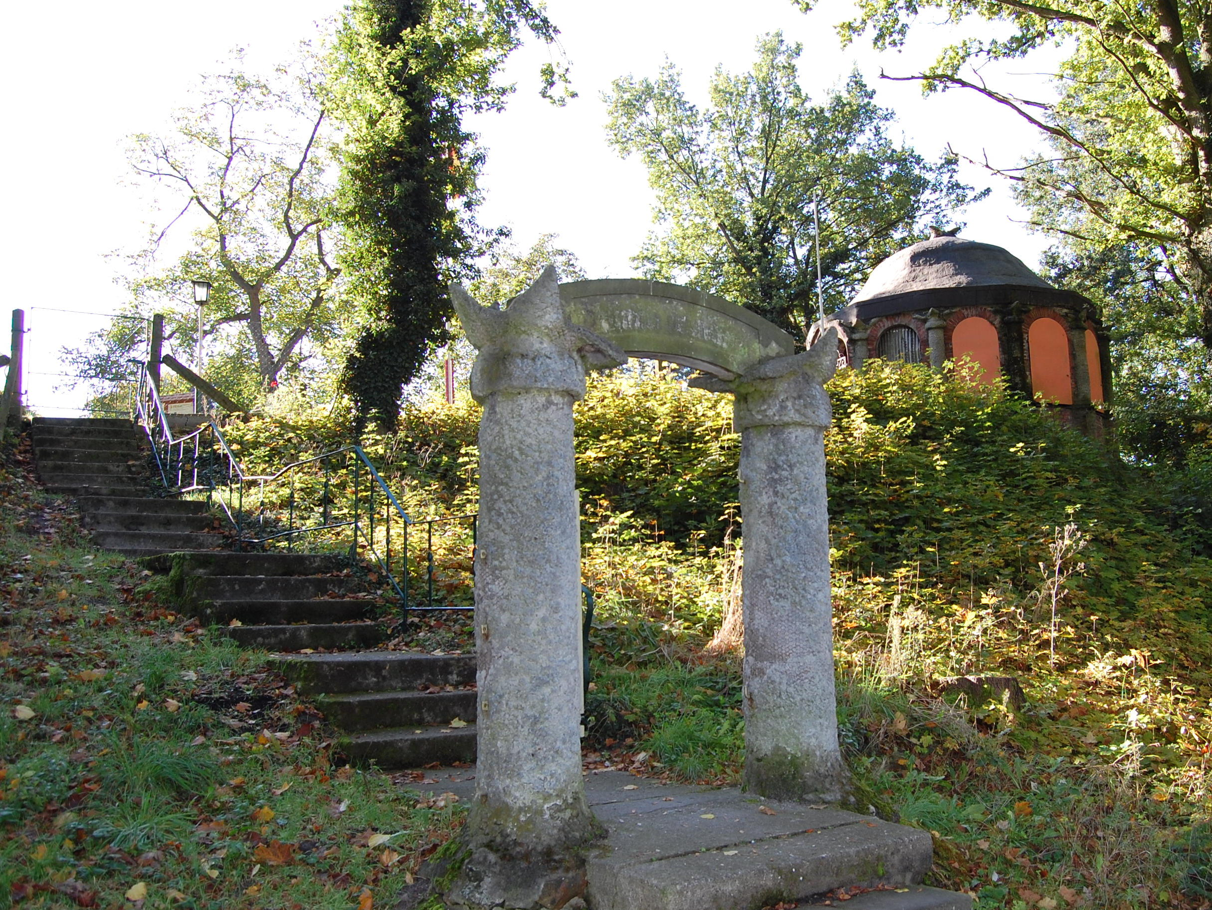 von Gustav Nagel errichtete Grotte in Arendsee